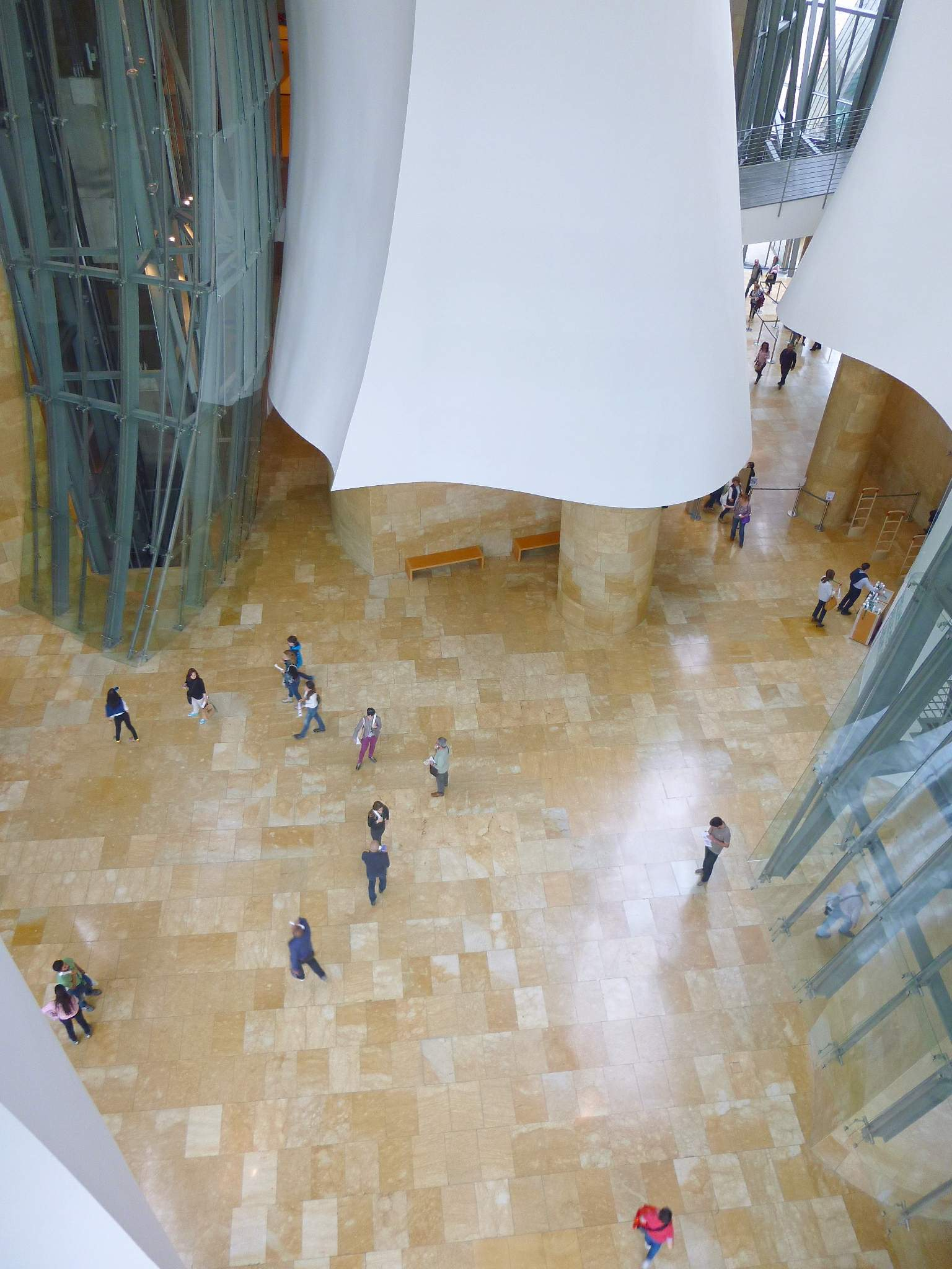 Museo Guggenheim Bilbao